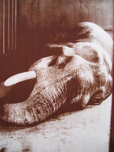 昭和18年(1943年) 猛獣処分の対象となったジョン倒れる。絶食による餓死。「かわいそうなぞう」に描かれた。上野動物園。開園125周年パネル展。